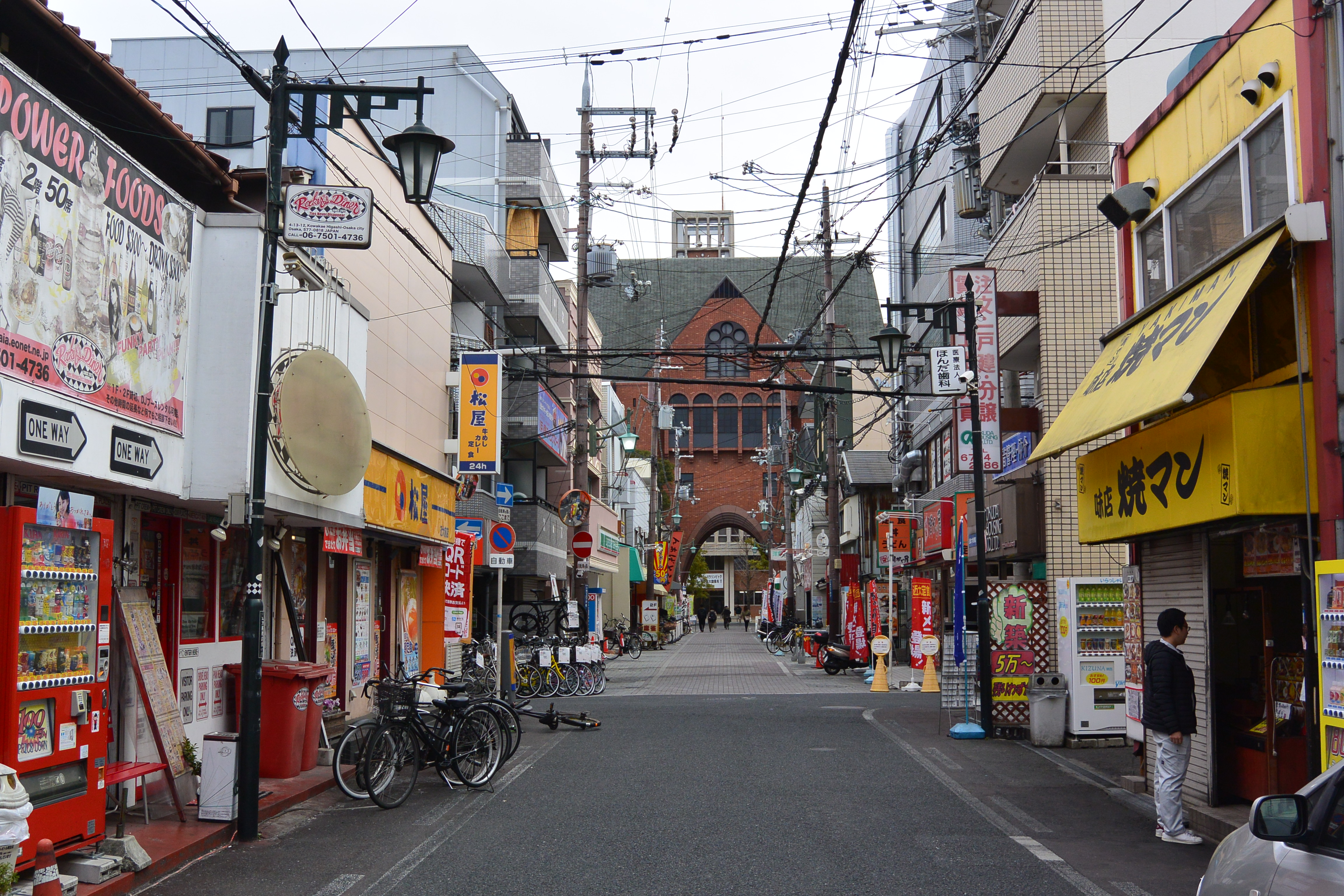 東大阪市の近畿大学正門前の商店街、休日のため学生の数は少ない Nikon 1 AW1 + 1 Nikkor AW 11-27.5mm f/3.5-5.6